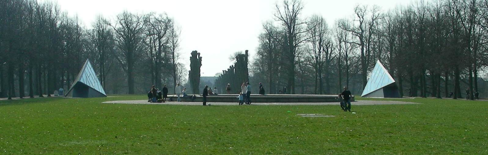 Cisternerne, Frederiksberg, Danmark